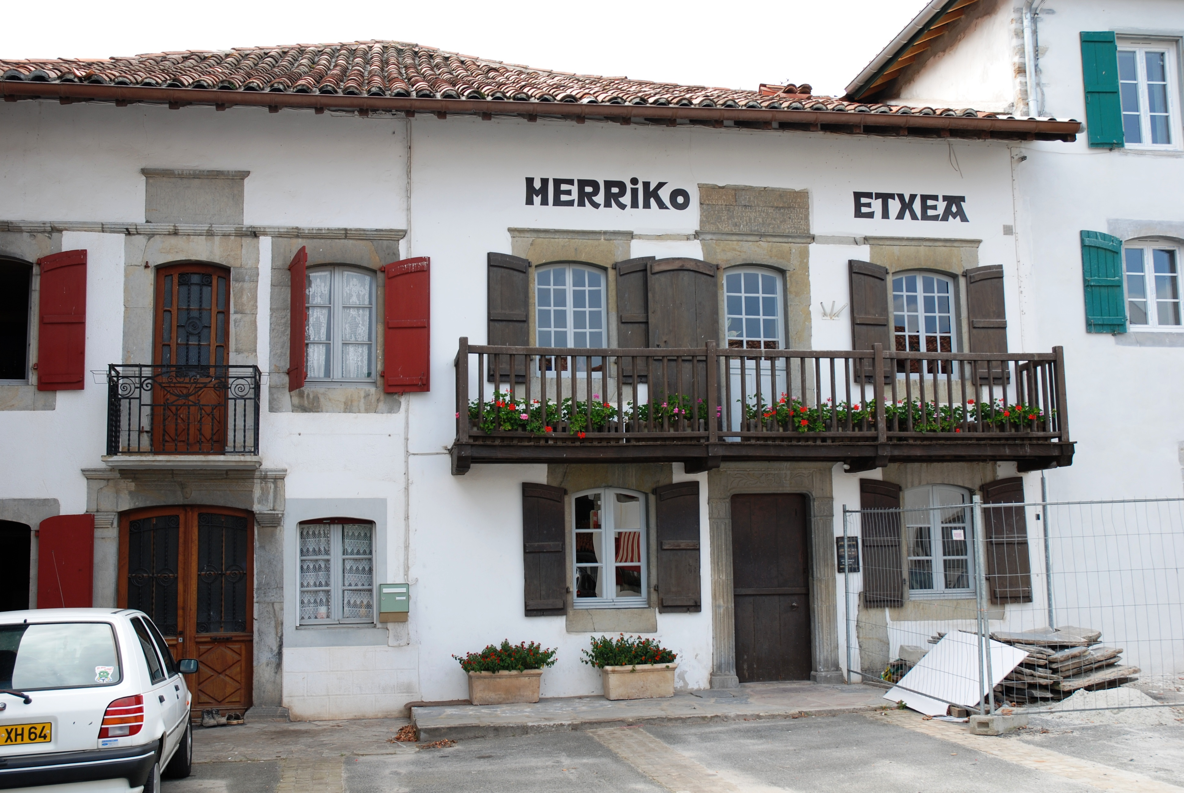 Hélette, la mairie